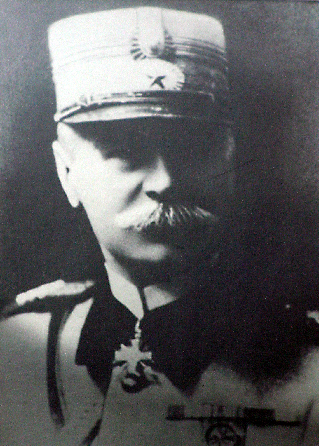 Generalul Gheorghe Mărdărescu.